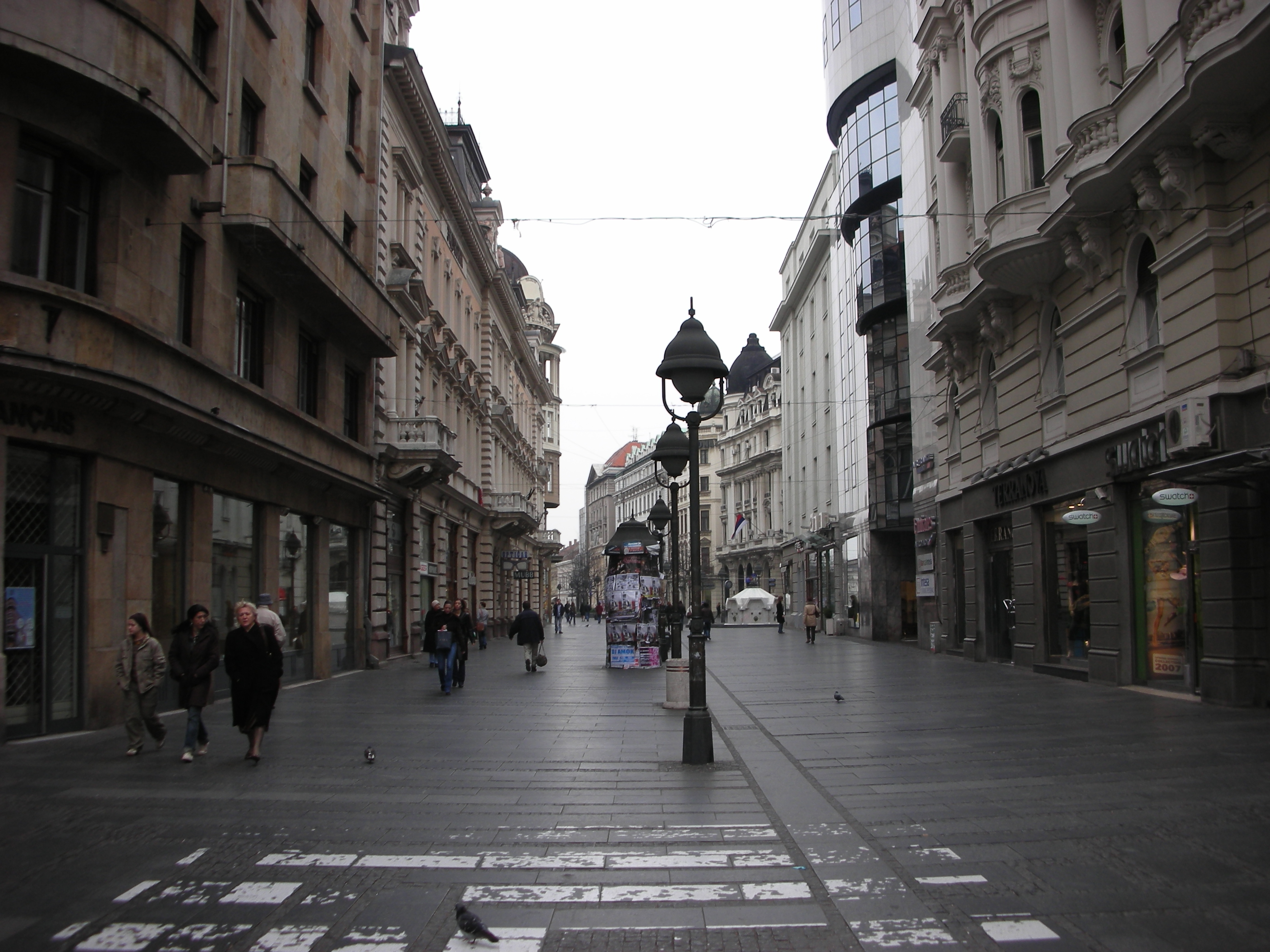 Knez Mihailova street in Belgrade.